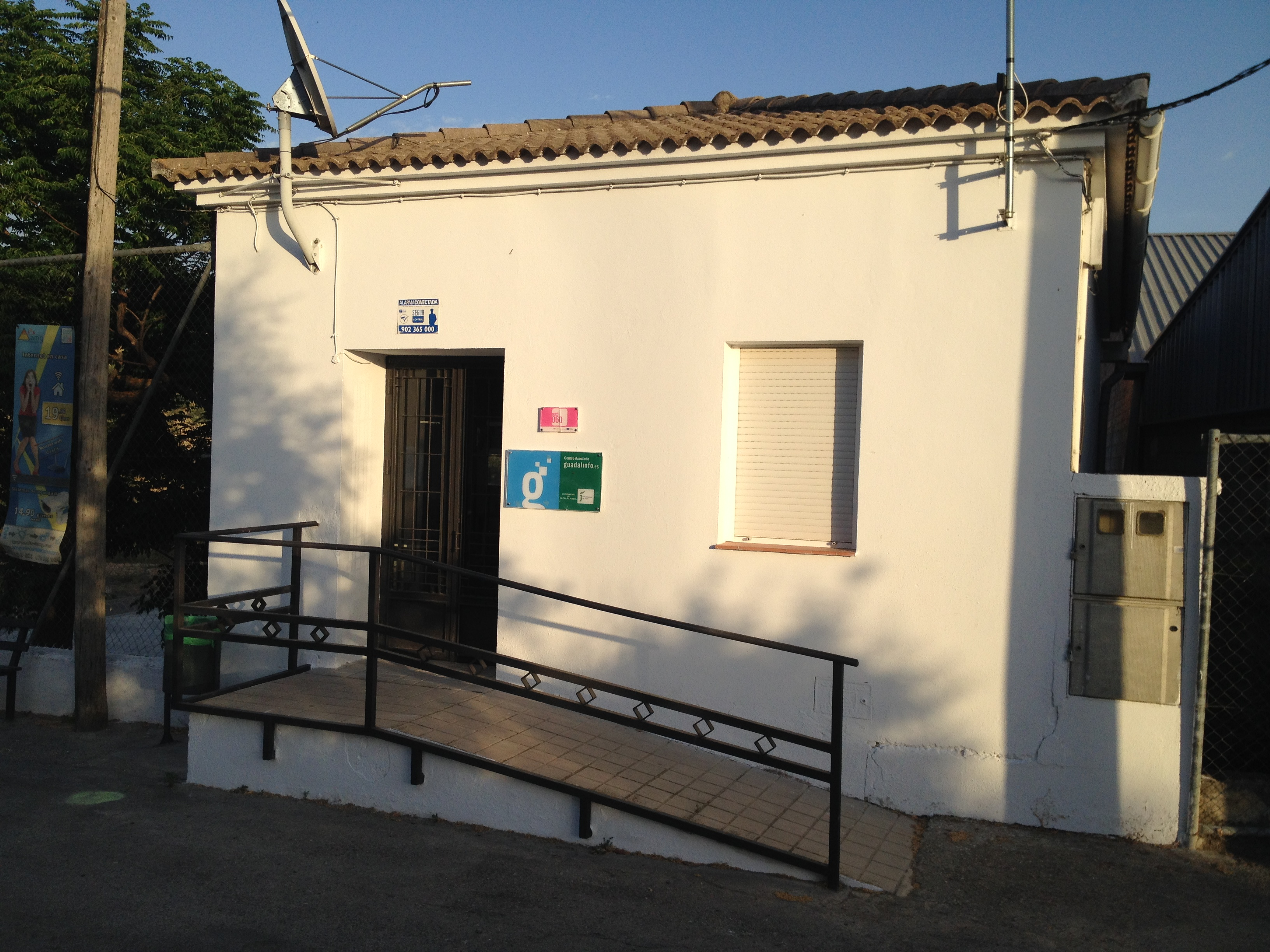 Fotografía del telecentro de Venta de Agramaderos.